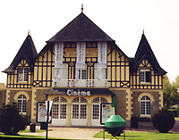 Cinéma